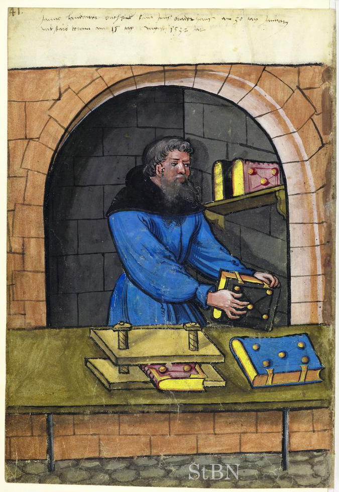 Transkription und weitere Informationen Hanns (Hans) Landawer (Landauer), buchbinder (Buchbinder)